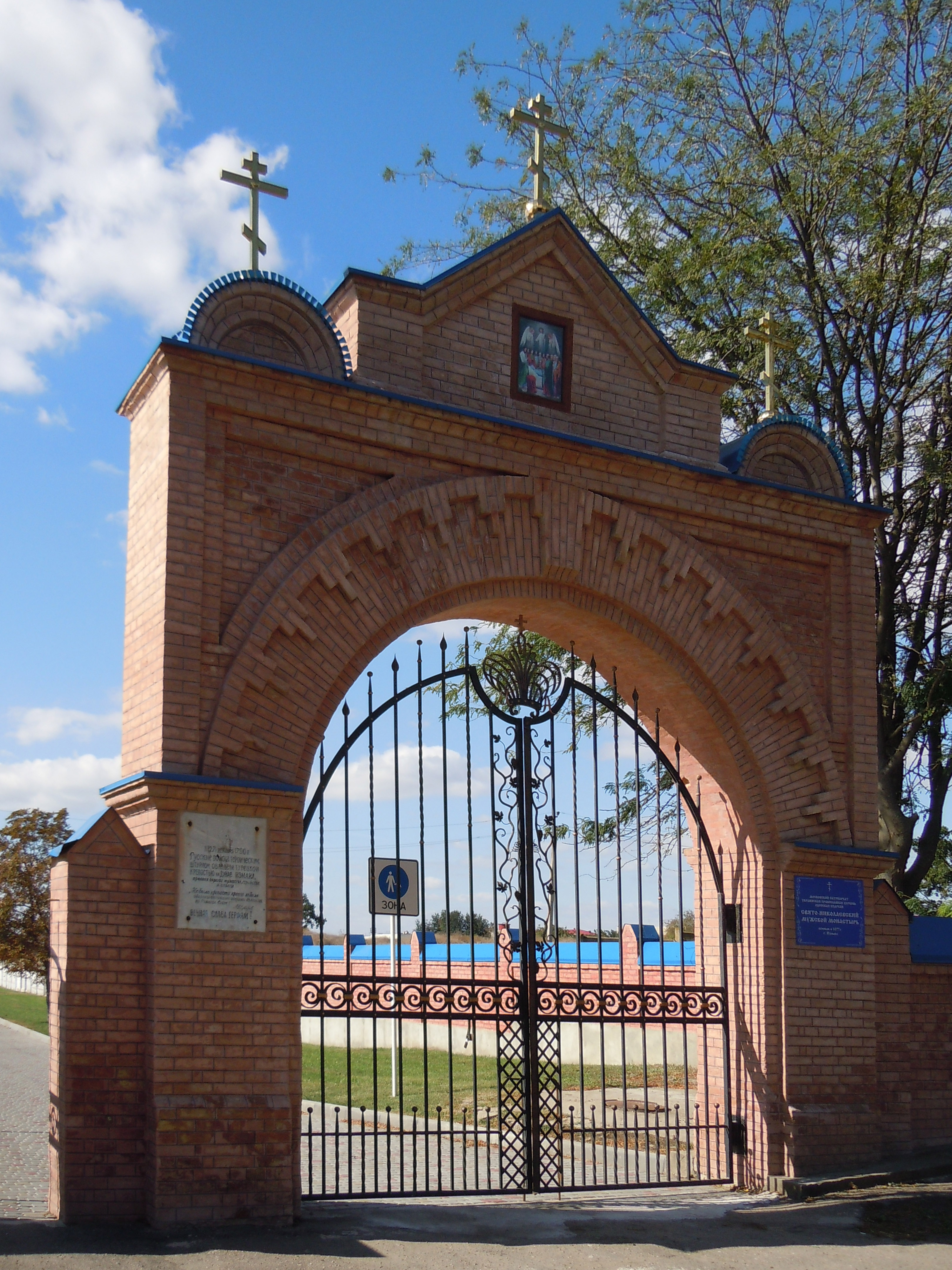 Вхід до меморіалу Ізмаїльської фортеці. Брама колишнього Румунського кладовища, тепер головні ворота Свято-Миколаївського монастиря.